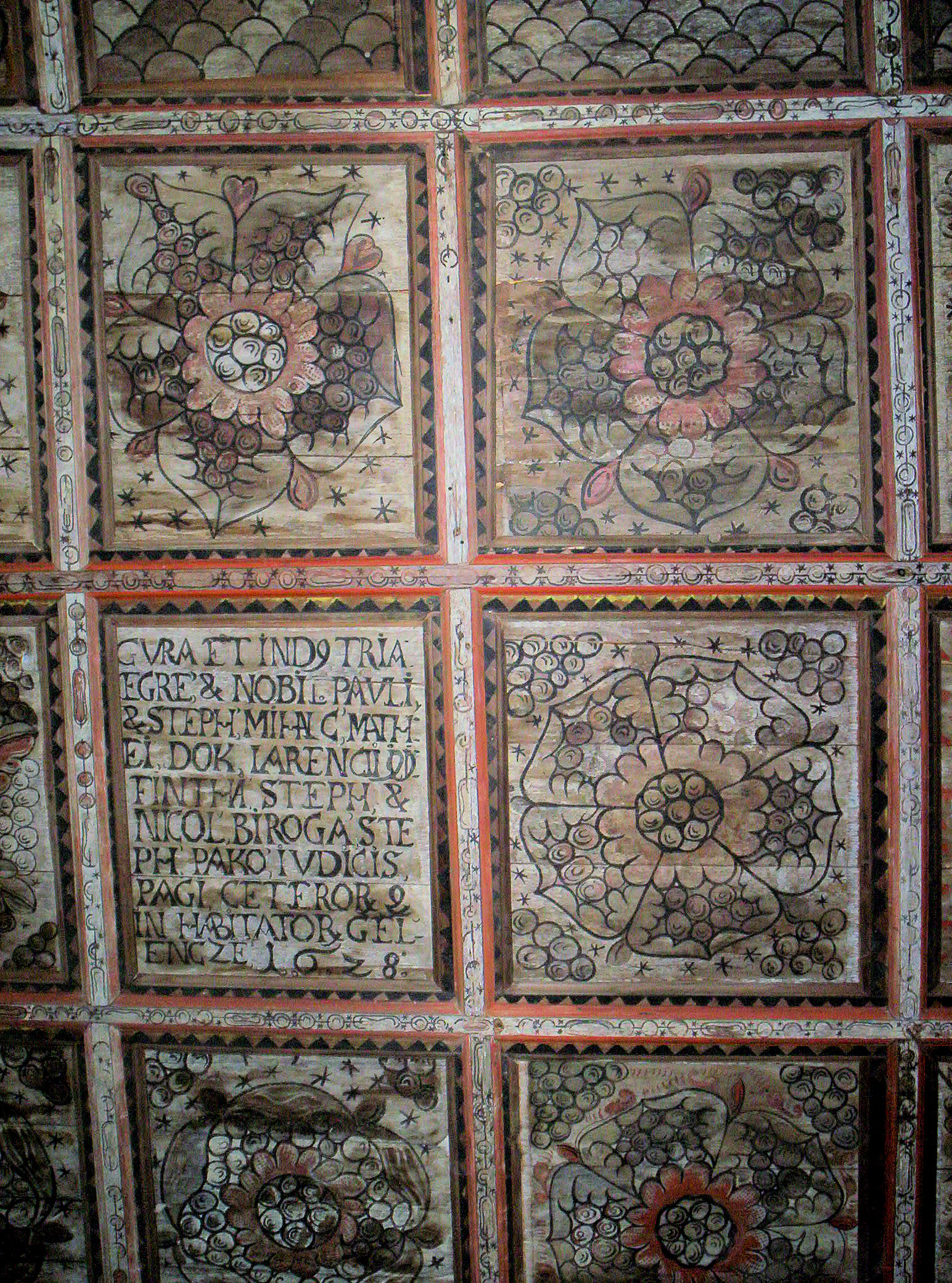 Mennyezetkazetták (1628) a gelencei Szent Imre-templomban – photo taken by uploader User:Csanády in 2006.